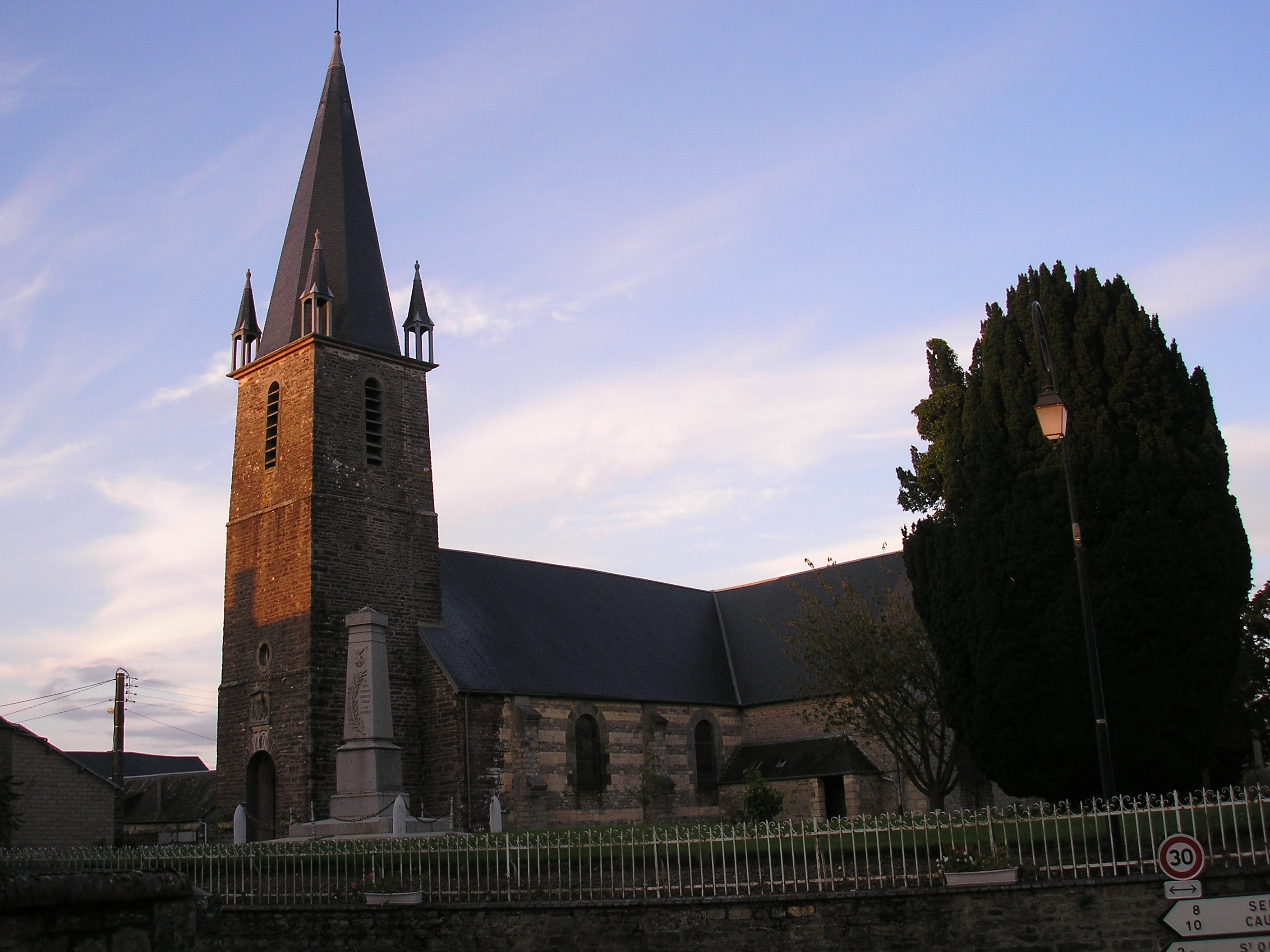 Saint-Martin-des-Besaces (Normandie, France). Eglise Saint-Martin.